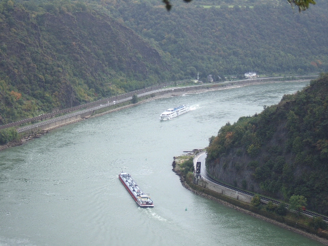 Rhein - Blick von der Loreley Url